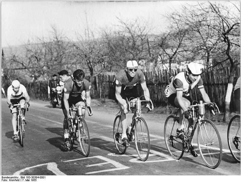 VIII. Friedensfahrt, Klich, Vesely, Tschishikowv Zentralbild Kronfeld Bey-Ku 7.5.1955 - 3. Etappe Friedensfahrt Prag-Berlin-Warschau von Brno nach Tabor über 175 km. UBz: Ein Ausreissversuch ist geglückt. Der Spitze gehört auch der DDR-Fahrer Zabel (links) an. Ferner von links: Klich, Vesely (beide CSR) und Tschishikow (UdSSR).